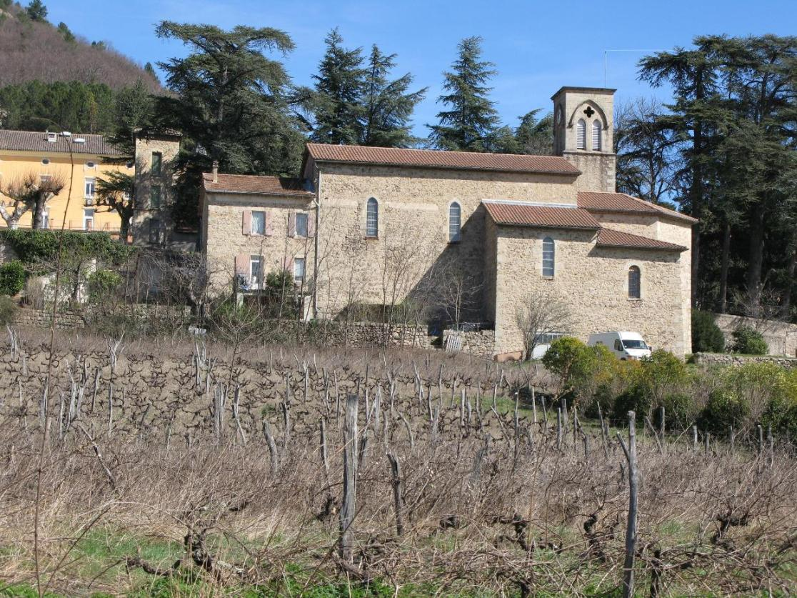 Village de Rocher (Ardèche)